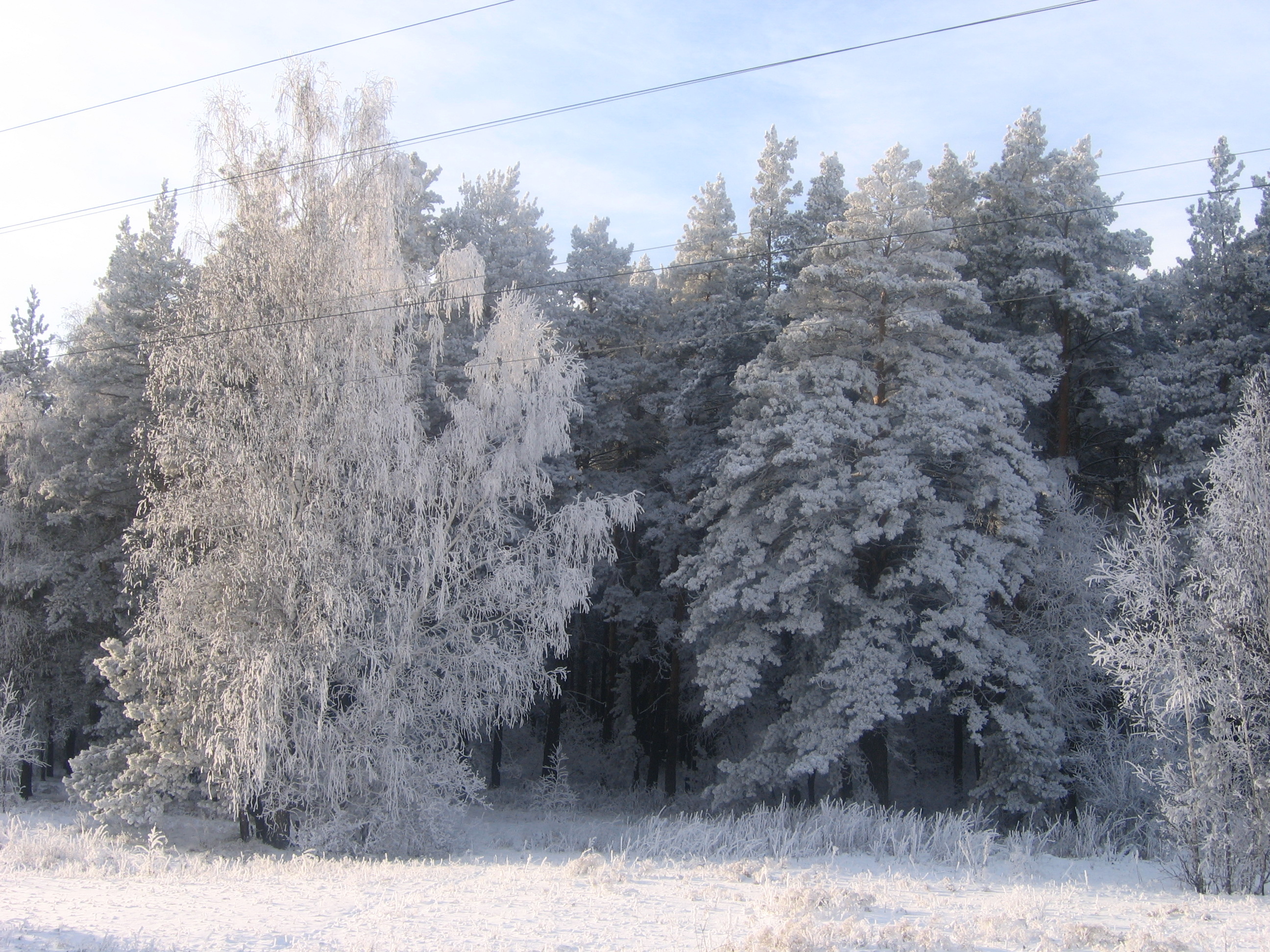 Касмалинский ленточный бор зимой. (Алтайский край. Россия)